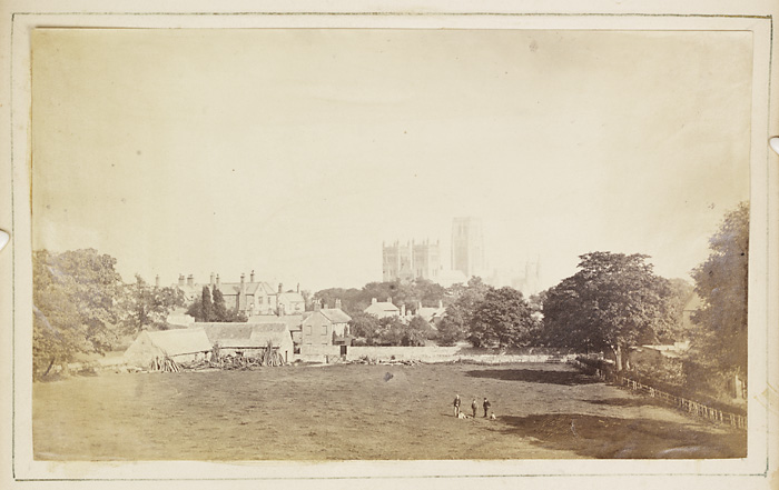 Teitl Cymraeg/Welsh title: Golygfa o Gadeirlan Durham Dyddiad/Date: 185- Cyfeiriad/Reference: crj00151 (PG2064/70) Rhif cofnod / Record no.: 3590900 Rhagor o wybodaeth am Ffotograffiaeth Gynnar Abertawe yn Llyfrgell Genedlaethol Cymru More information about Early Swansea Photography at the National Library of Wales